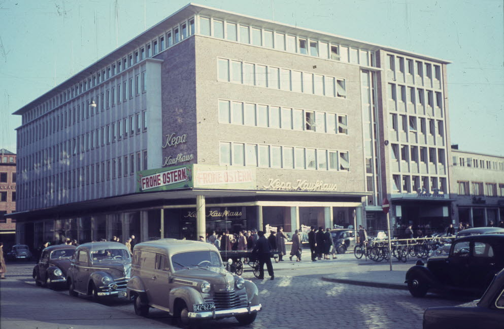 Kepa-Kaufhaus in der Holstenstraße 55-57 (Ecke Hafenstraße)